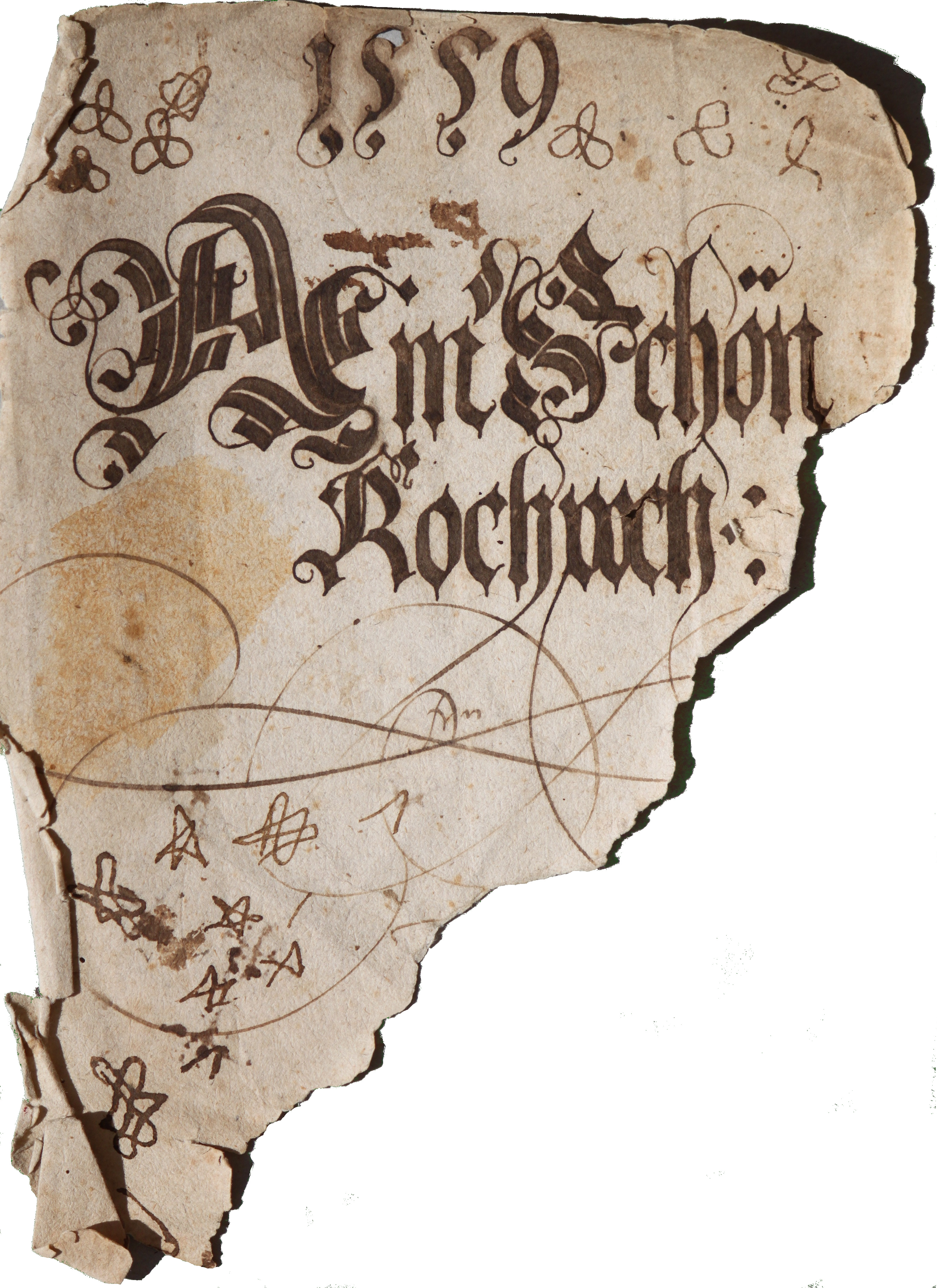 Ein schön Kochbuch 1559 Gerissene Titelseite